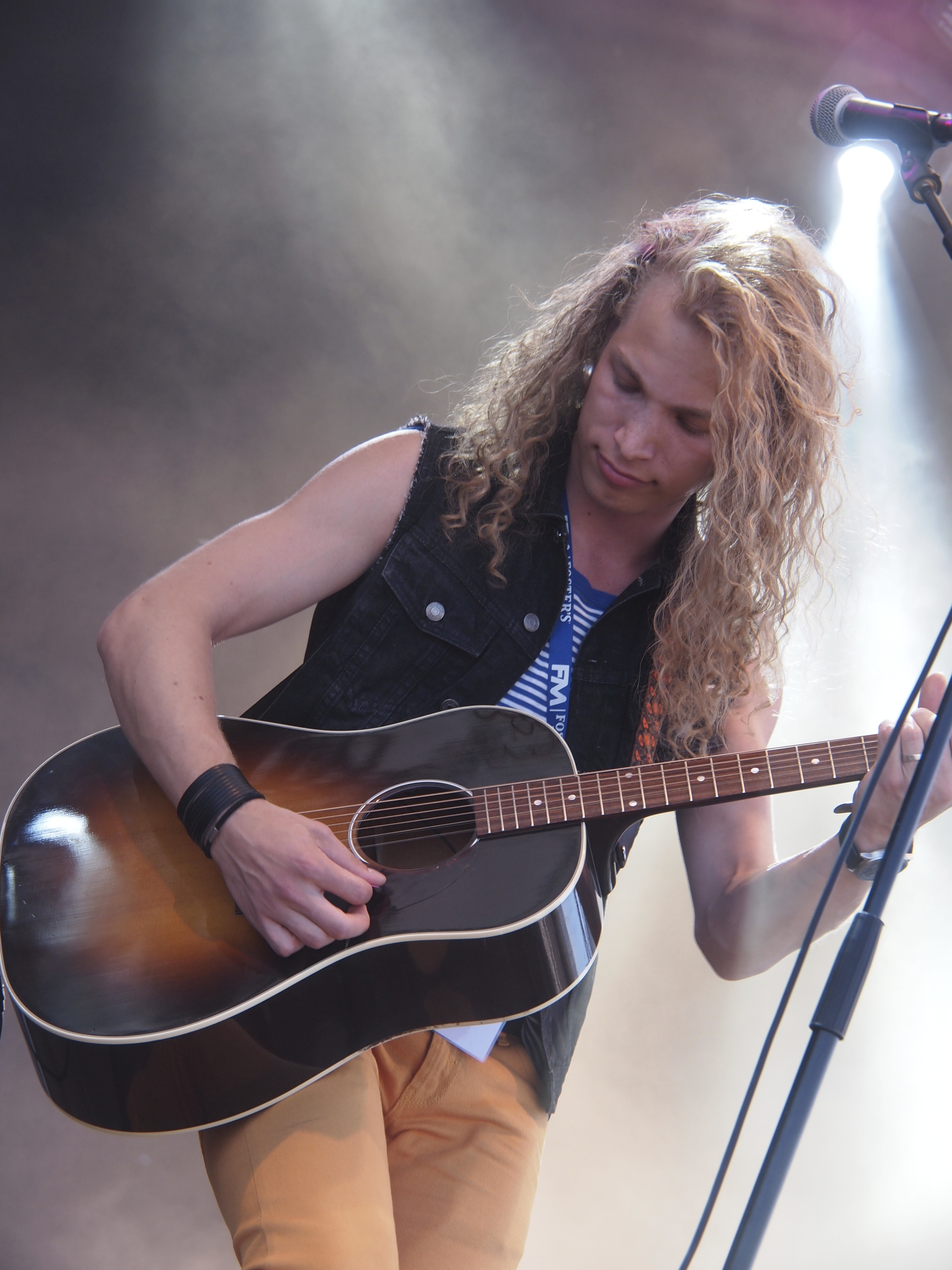 Ilpo Kaikkonen esiintyy Kotkan Meripäivillä 26.7.2013